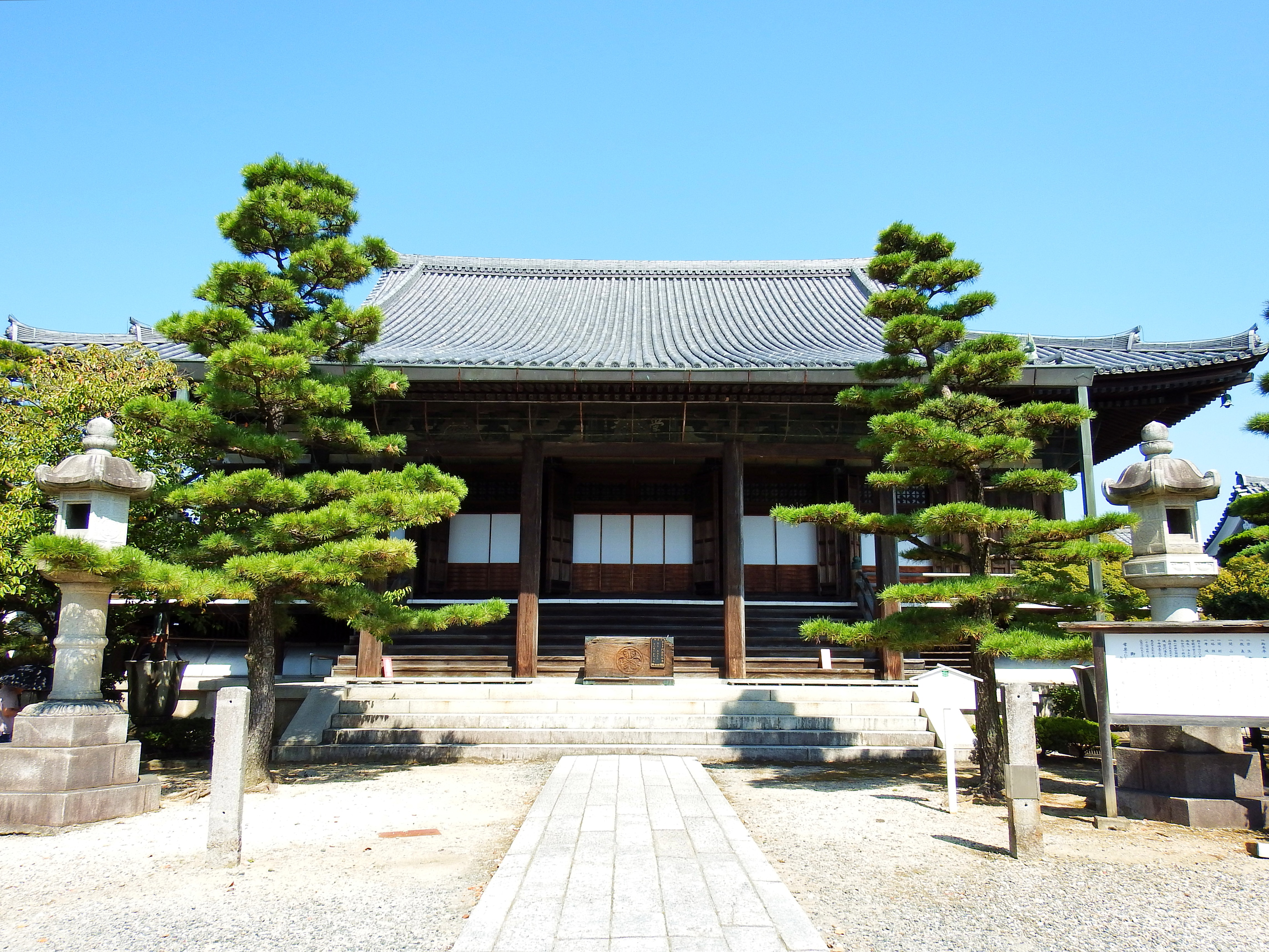 常楽寺本堂